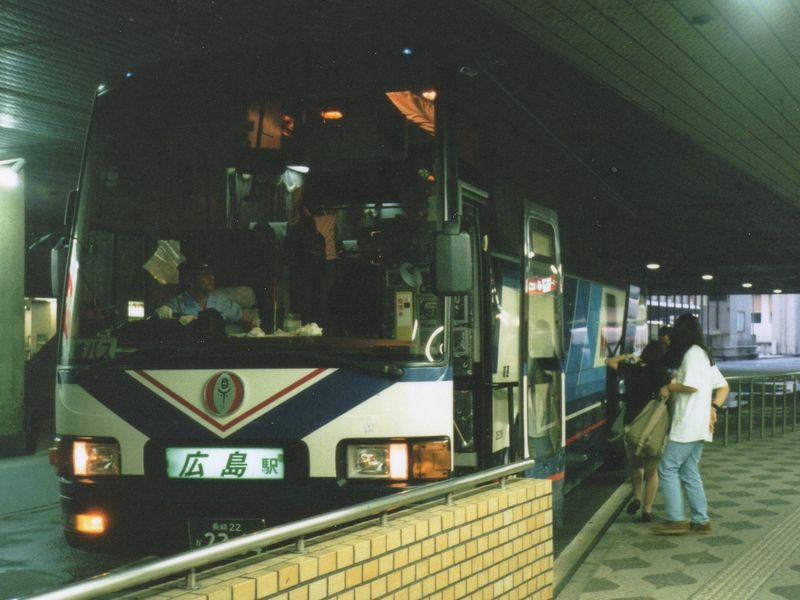 Nagasaki Ken-ei Bus 2E29 Mitsubishi P-MS729S at Hiroshima Bus Center